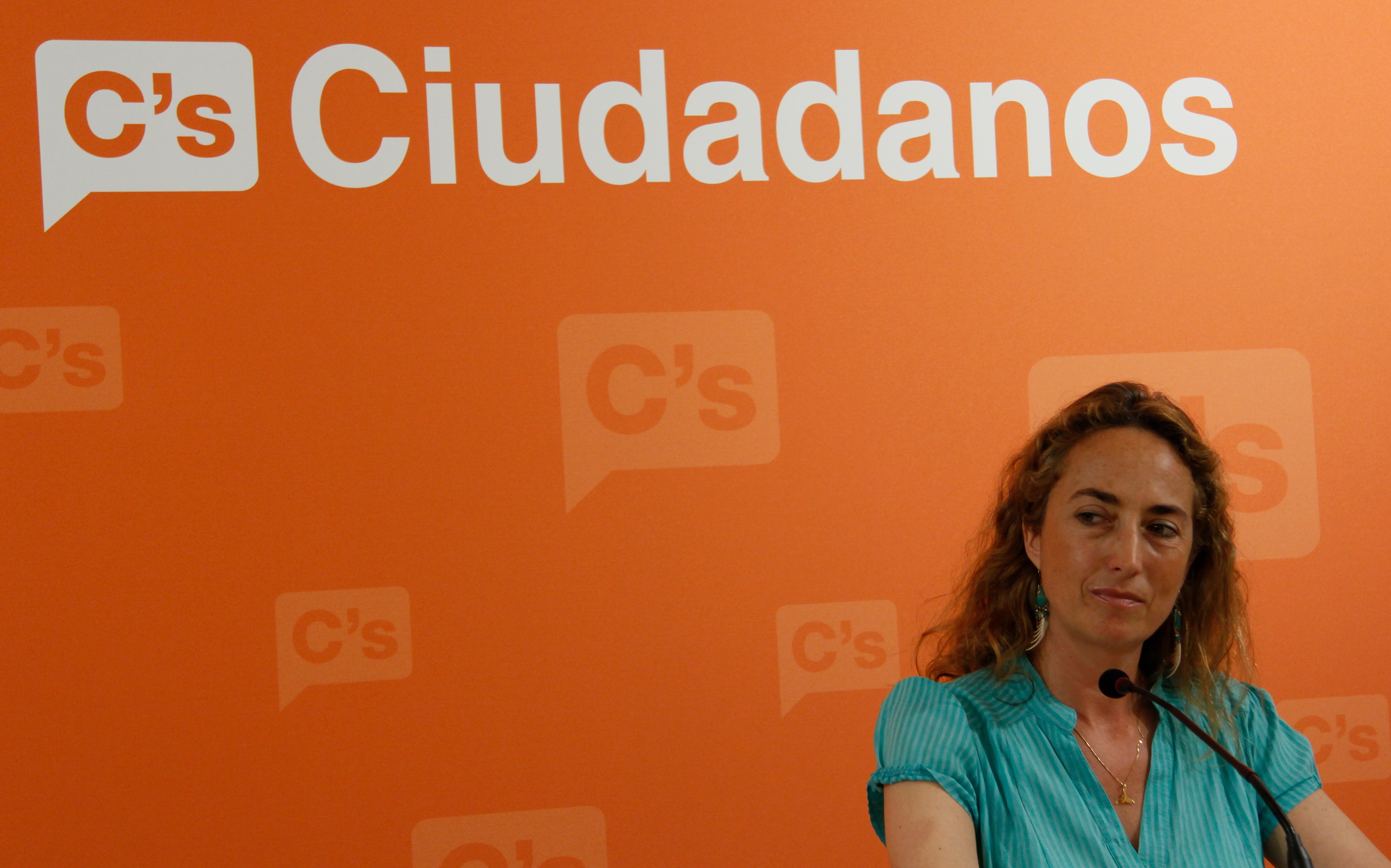 Carolina Punset